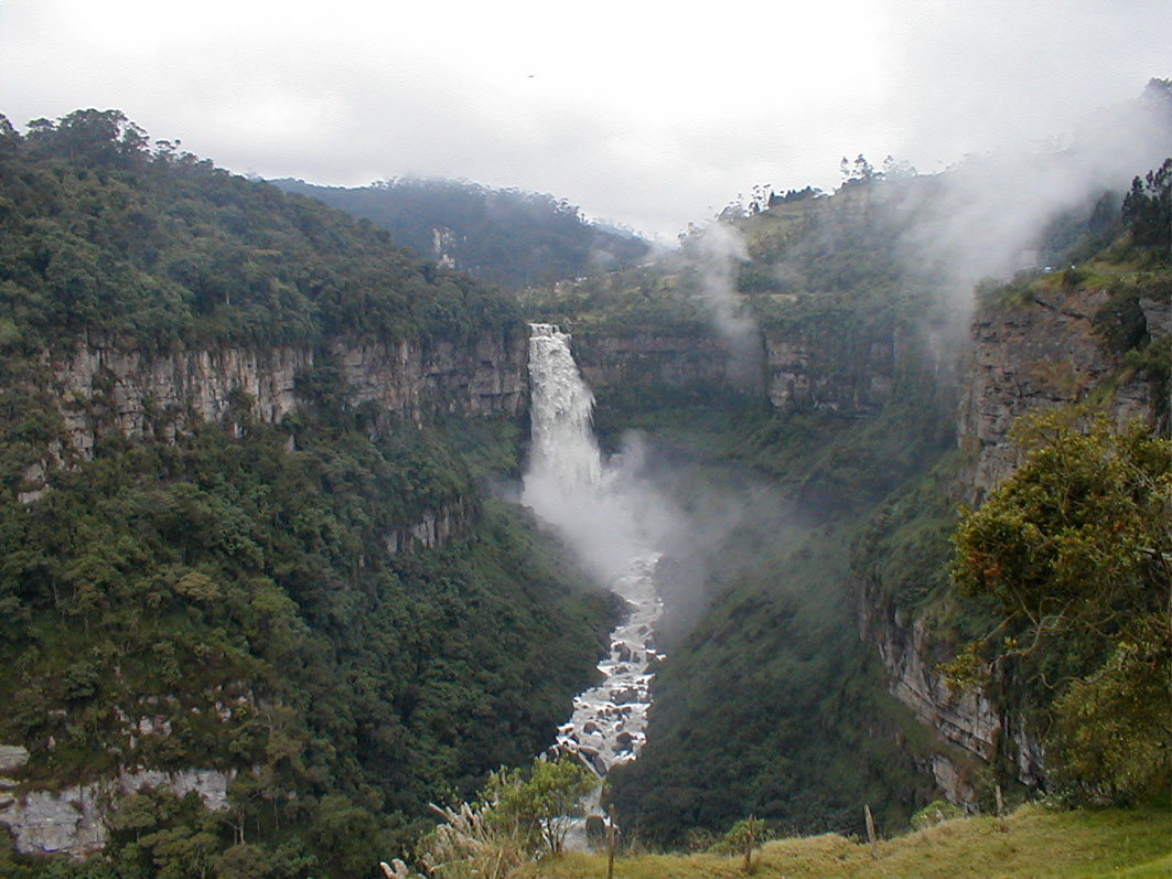 Salto del Tequendama. Río Bogotá. Soacha, Cundinamarca. Colombia. Photo: zeafra / Oxigénate.